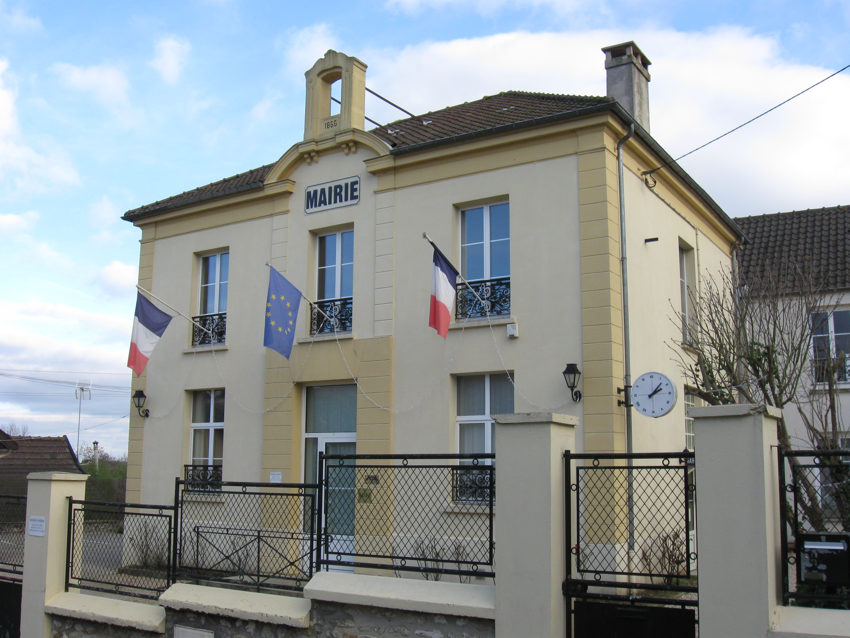 Mairie de Jablines. (Seine-et-Marne, région Île-de-France).